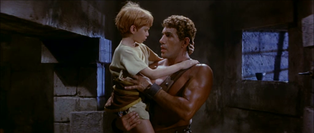 Scena del film